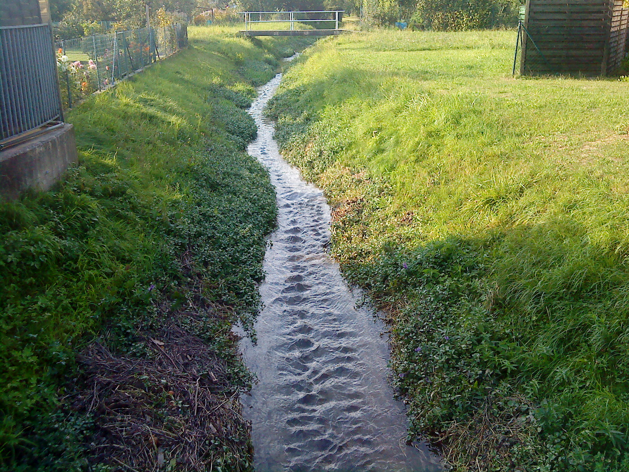 Der Hösbach im Markt Hösbach bevor er in die Aschaff mündet